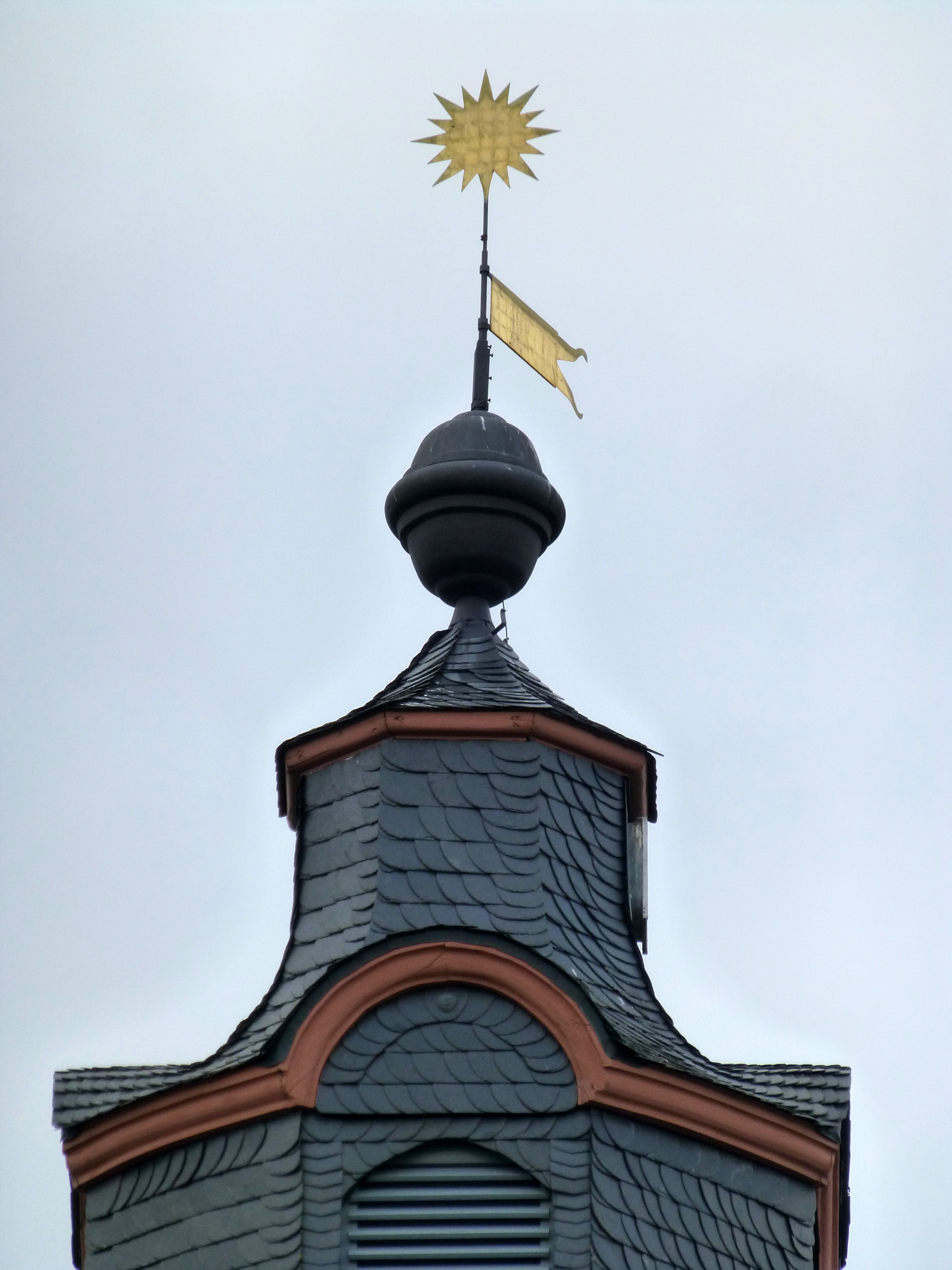 Turmspitze der Evangelischen Pfarrkirche in Kleinich